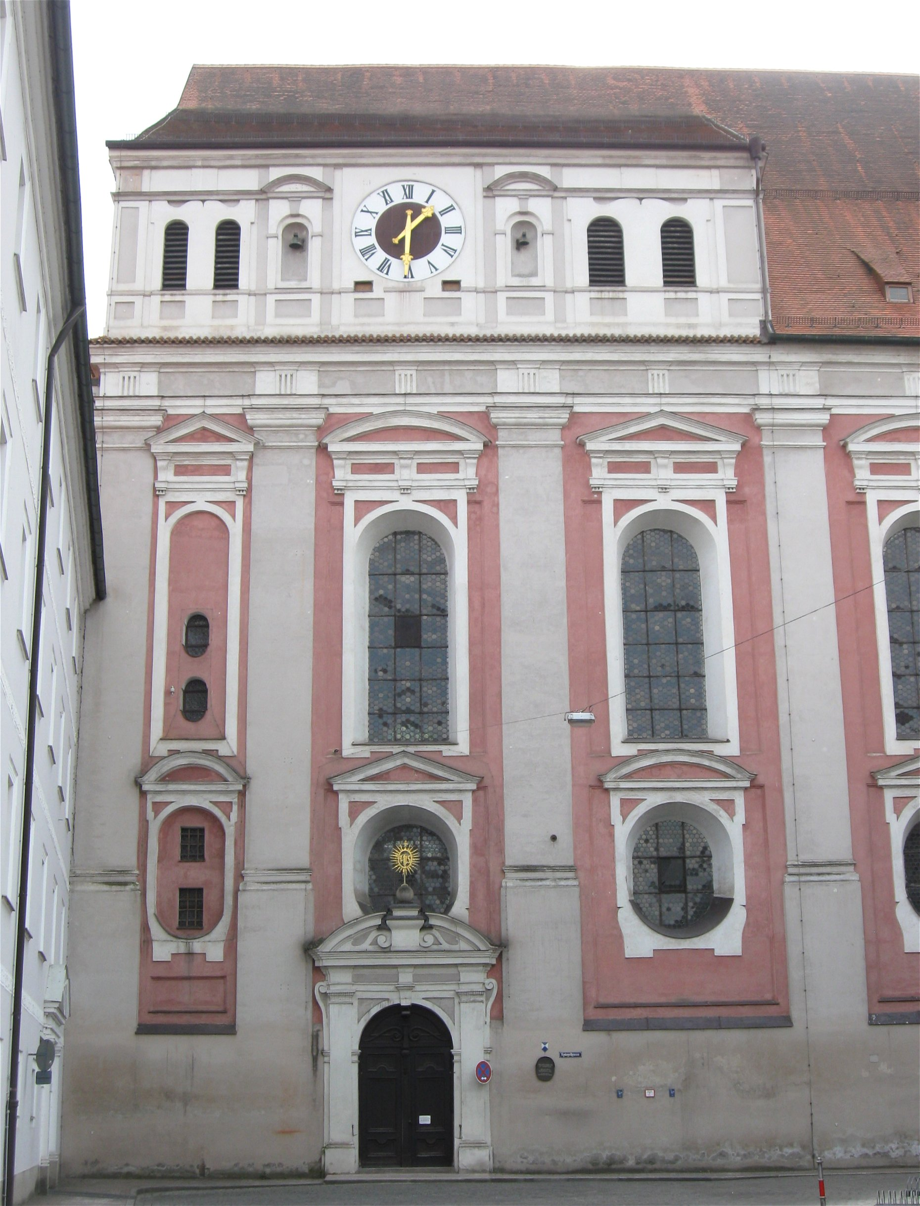 Neustadt 479; Ehem. Jesuitenkirche St. Ignatius, einschiffiger Bau mit wenig eingezogenem Chor, erbaut von Johannes Holl 1631 bis Mitte 17. Jahrhundert, Stukkaturen von Matthias Schmuzer 1640-1641; mit Ausstattung; Borgiaskapelle, im Obergeschoss eines Ausbaues, wohl Mitte 17. Jahrhundert; mit Ausstattung. D-2-61-000-392